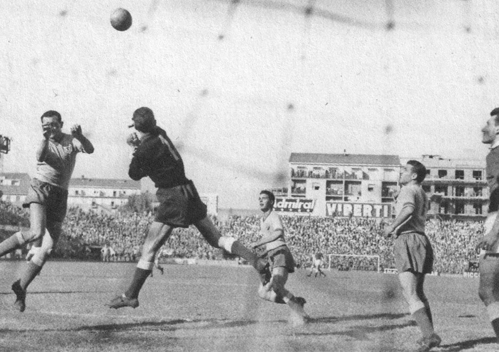 Torino (Italia), stadio Filadelfia, 15 settembre 1957. Una fase di gioco della sfida tra A.C. Torino e Alessandria U.S. (0-0) valevole per la 2ª giornata del campionato italiano di Serie A 1957-58.